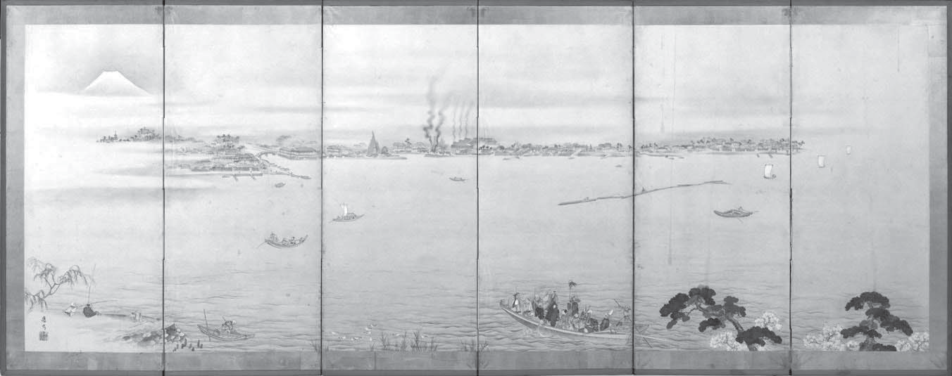 三好応岸筆《宇和島・江戸図屏風》左隻（江戸図） 愛媛県美術館蔵